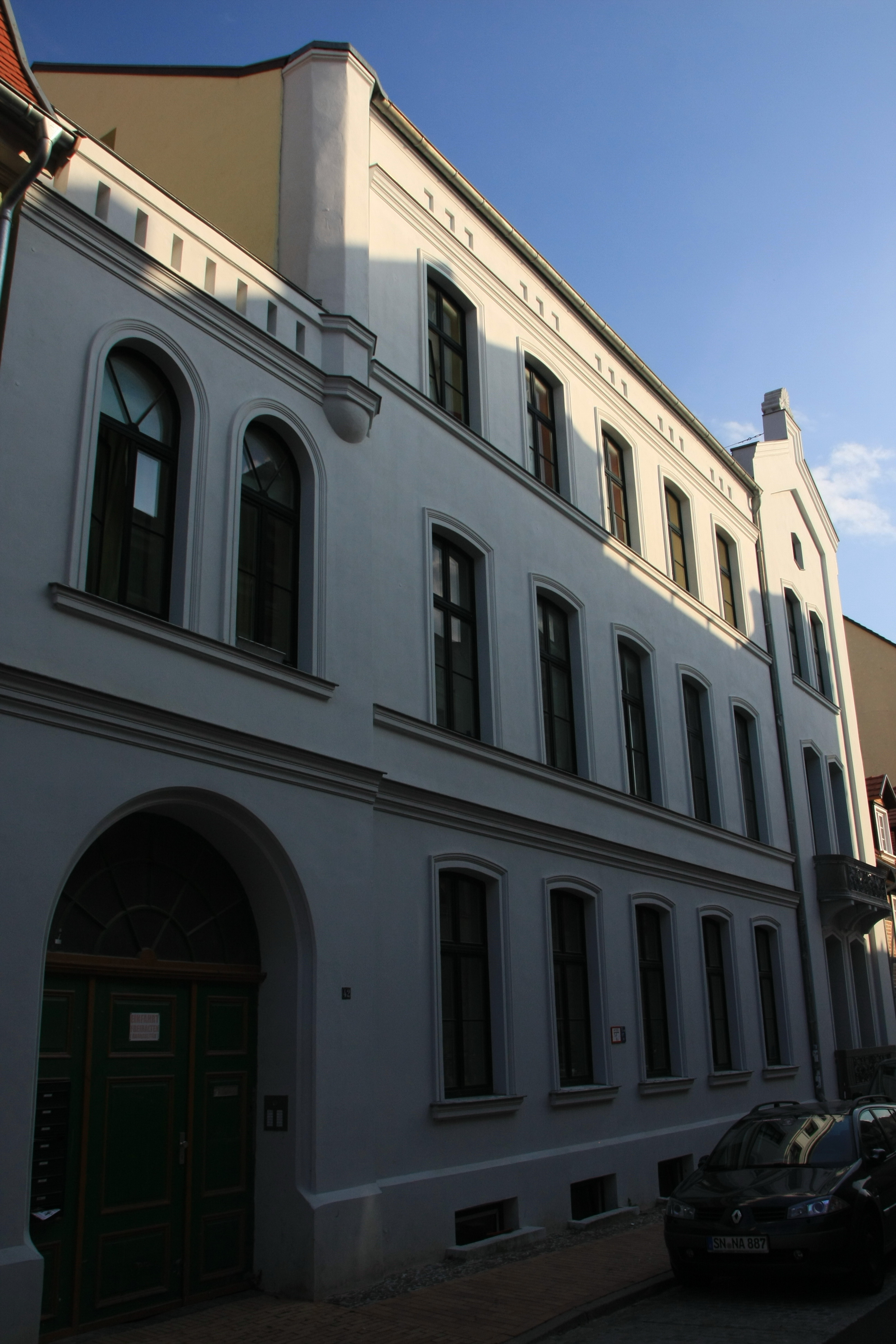 19055 Schwerin, Bergstraße 42